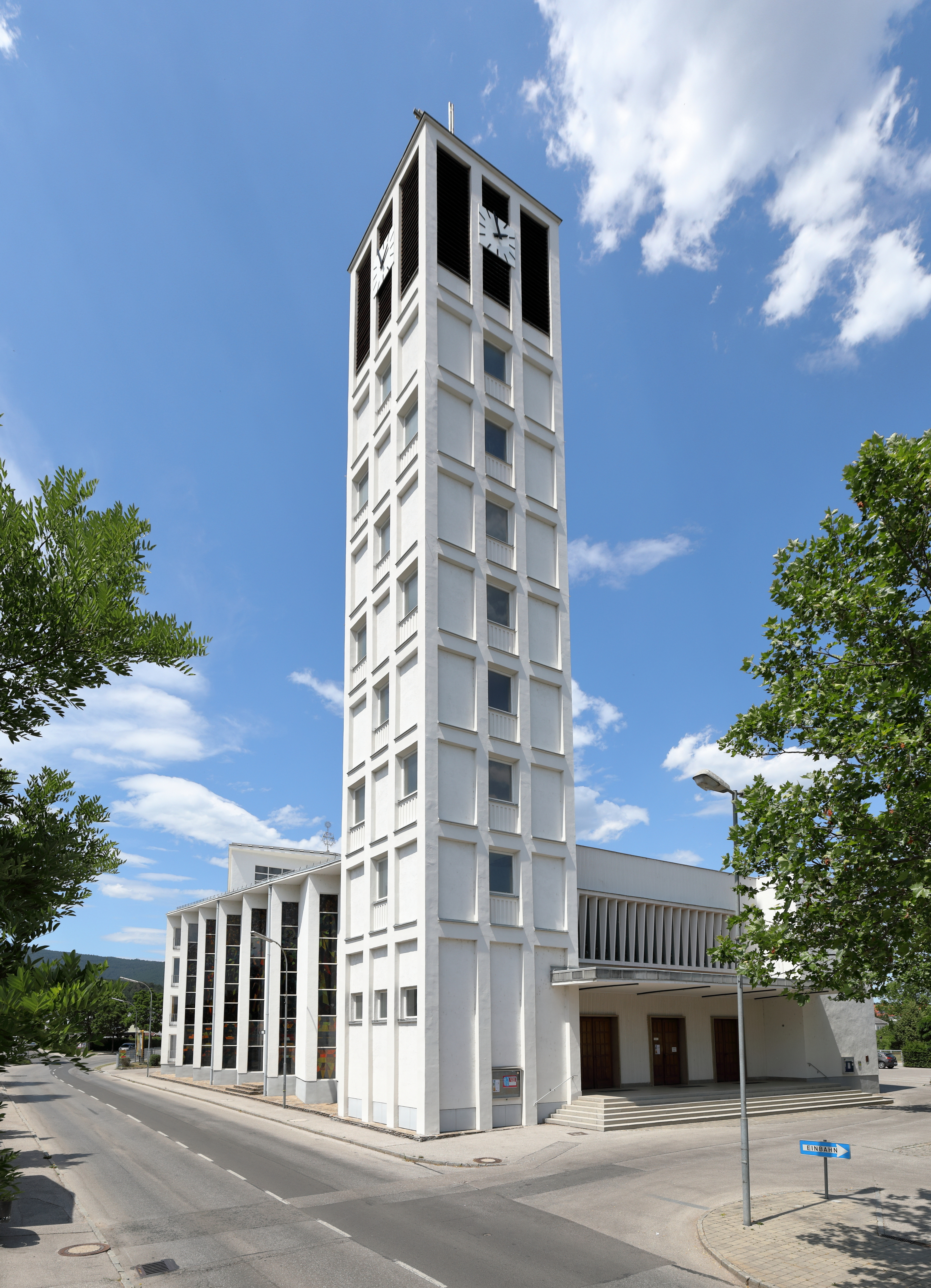 Südansicht der röm.-kath. Pfarrkirche in der niederösterreichischen Stadtgemeinde Ternitz.Die Kirche wurde nach Plänen des Architekten Josef Vytiska errichtet. Der Spatenstich erfolgte am 1. April 1957 und am 30./31. Mai 1959 fand die feierliche Einweihung durch Erbischof-Koadjutor Franz Jachym statt. Bis zu diesem Zeitpunkt stand den Ternitzern nur eine umgebaute Tischlerei in der Ruedlstraße als Notkirche zur Verfügung.